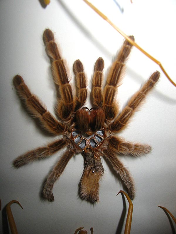 exuvia tarantula ventral